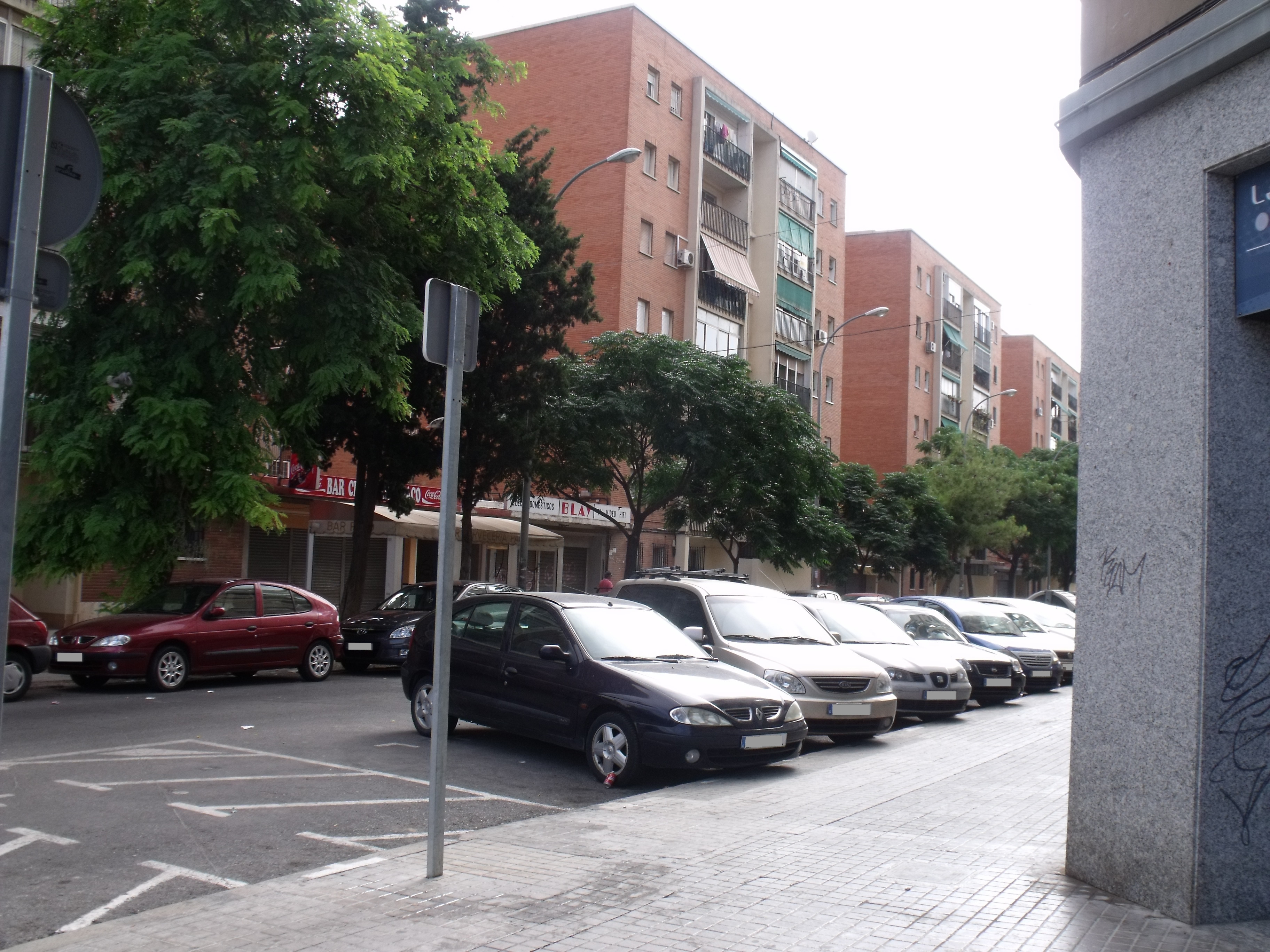 Calle Ángel del Alcázar. València.